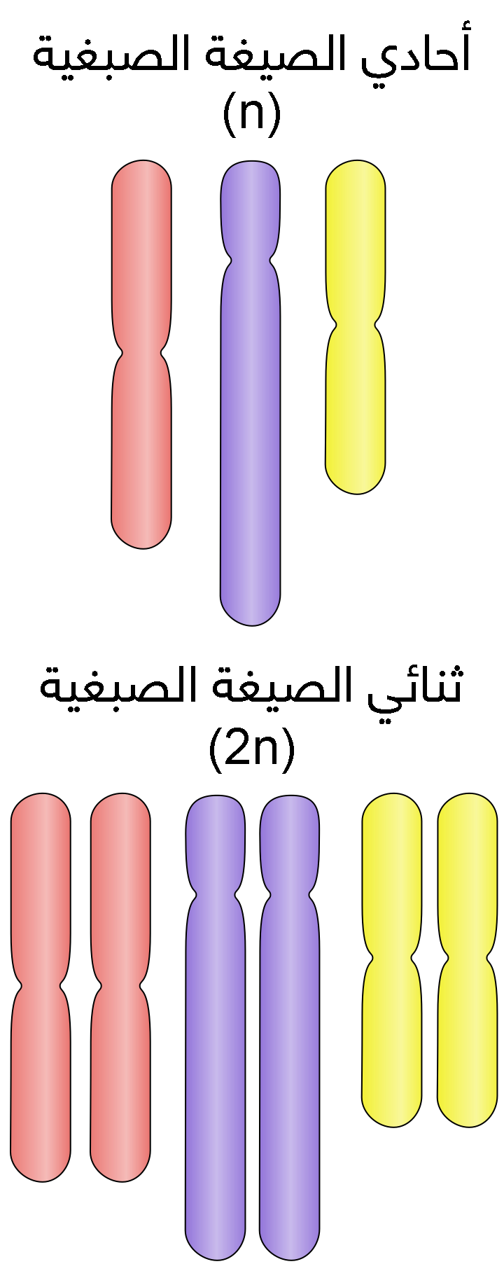 رسم يوضح التنظيم الصبغي عند الكائنات أحادية الصيغة الصبغية وثنائية الصيغة الصبغية